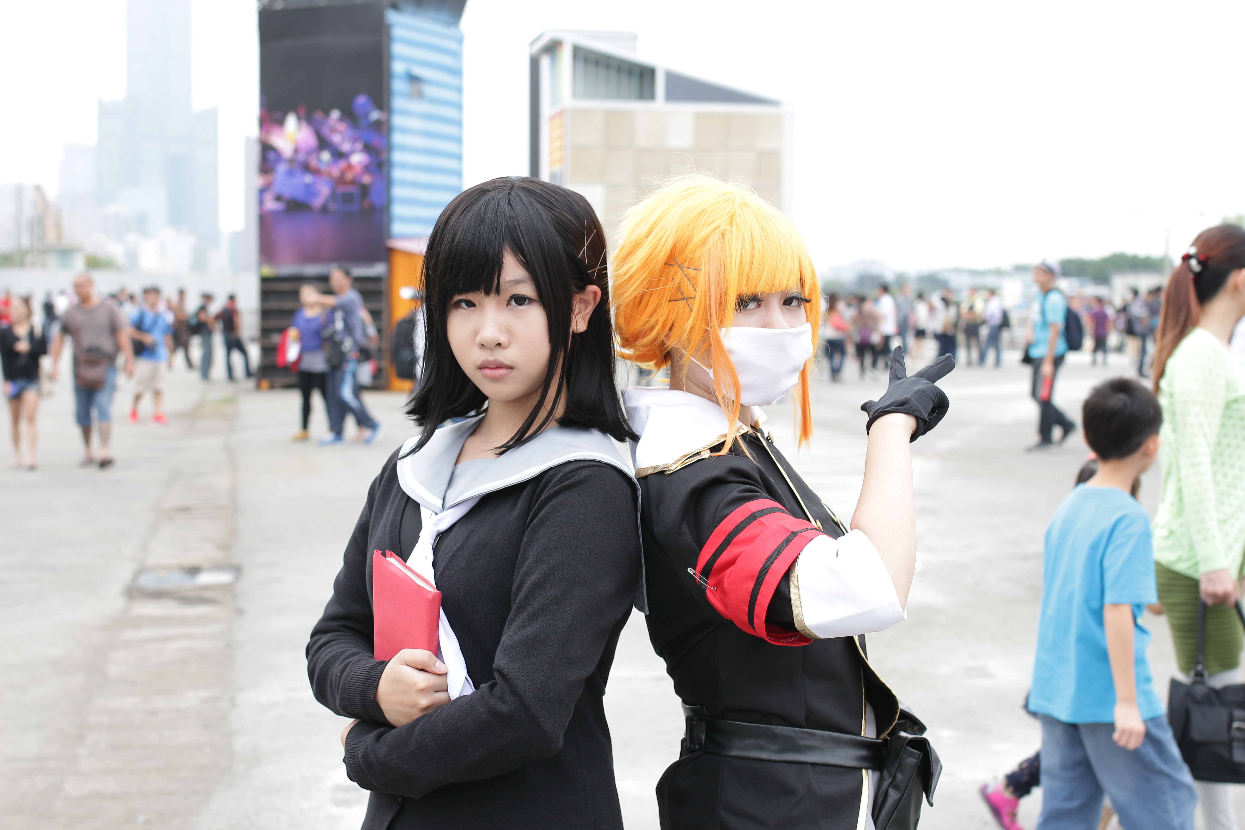 參與2014年高雄駁二動漫祭的角色扮演者：小玥（左）、KAKI（右）。